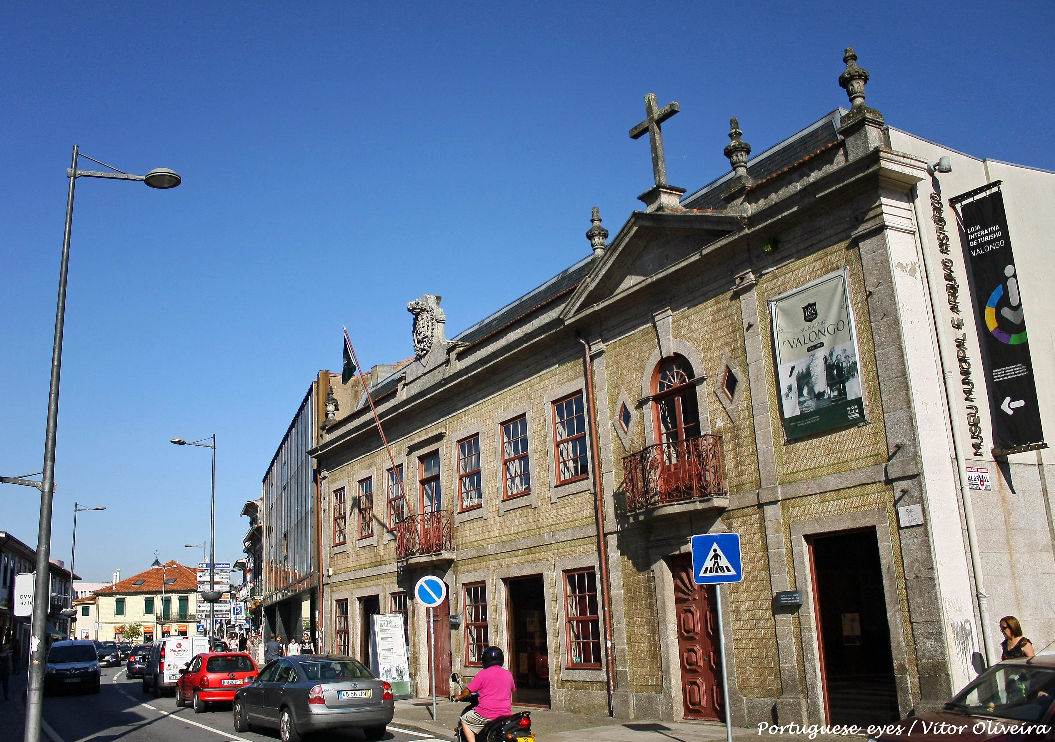 Valongo - Portugal 🇵🇹